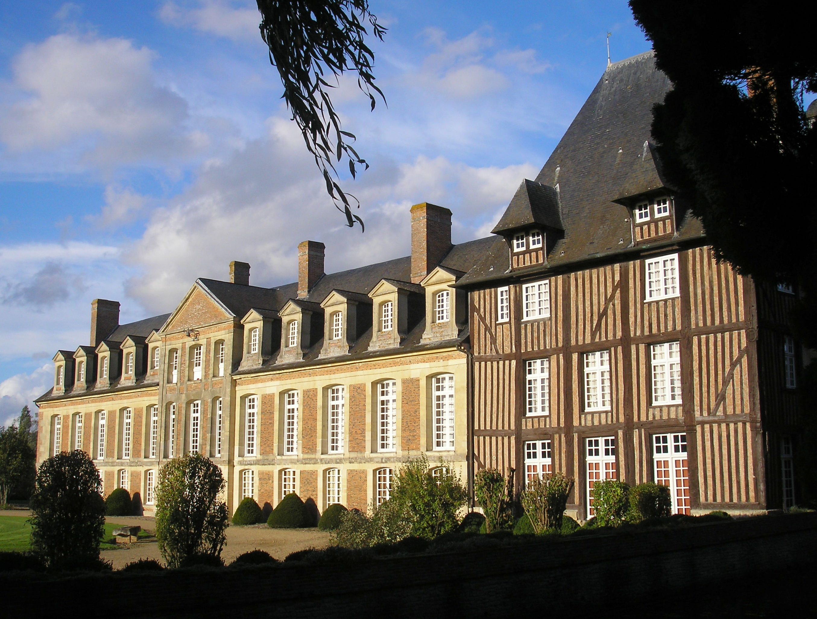 Grandchamp-le-Château (Normandie, France). Le château.